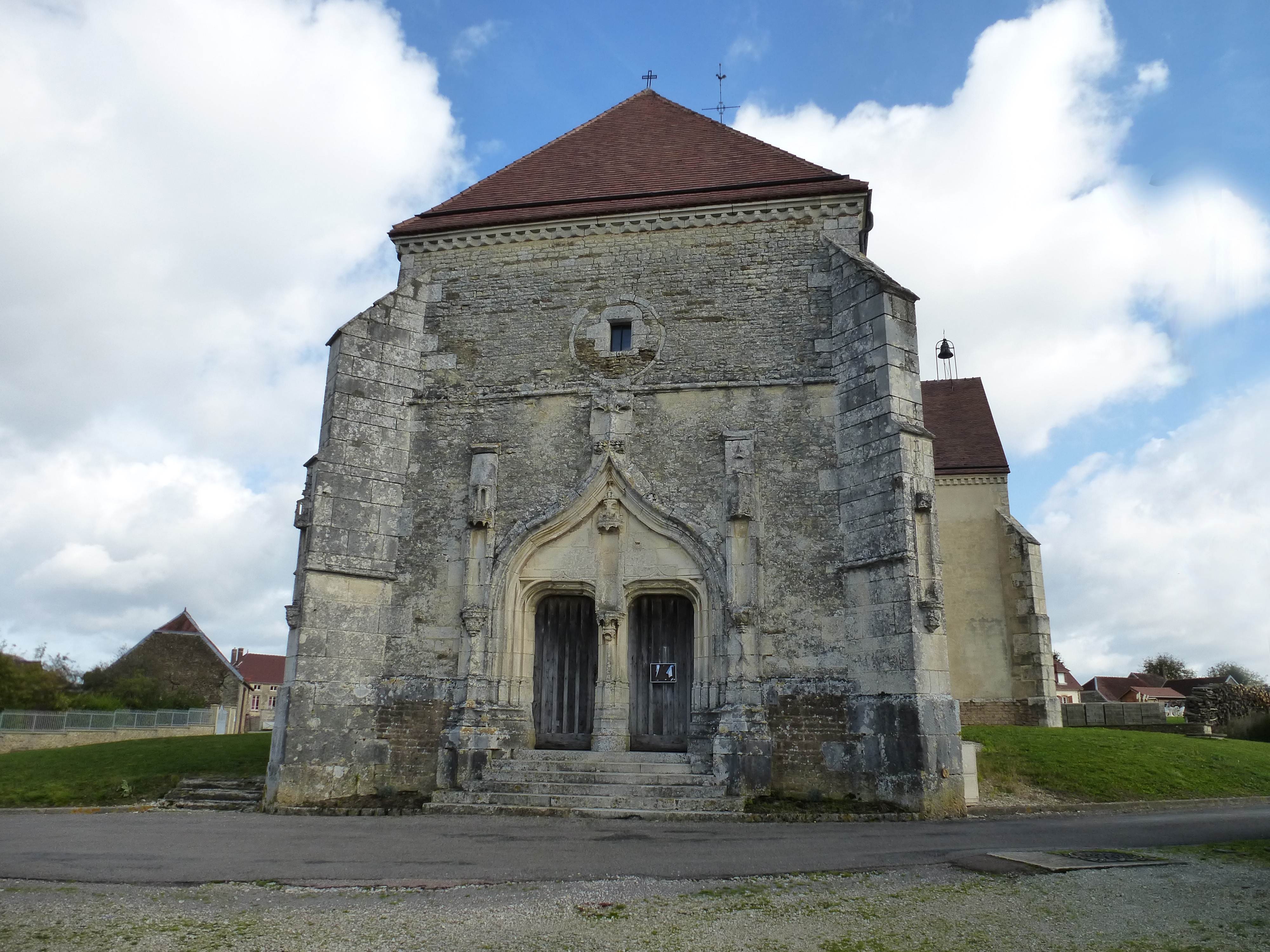 Eglise Saint-Léger (16ème siècle)